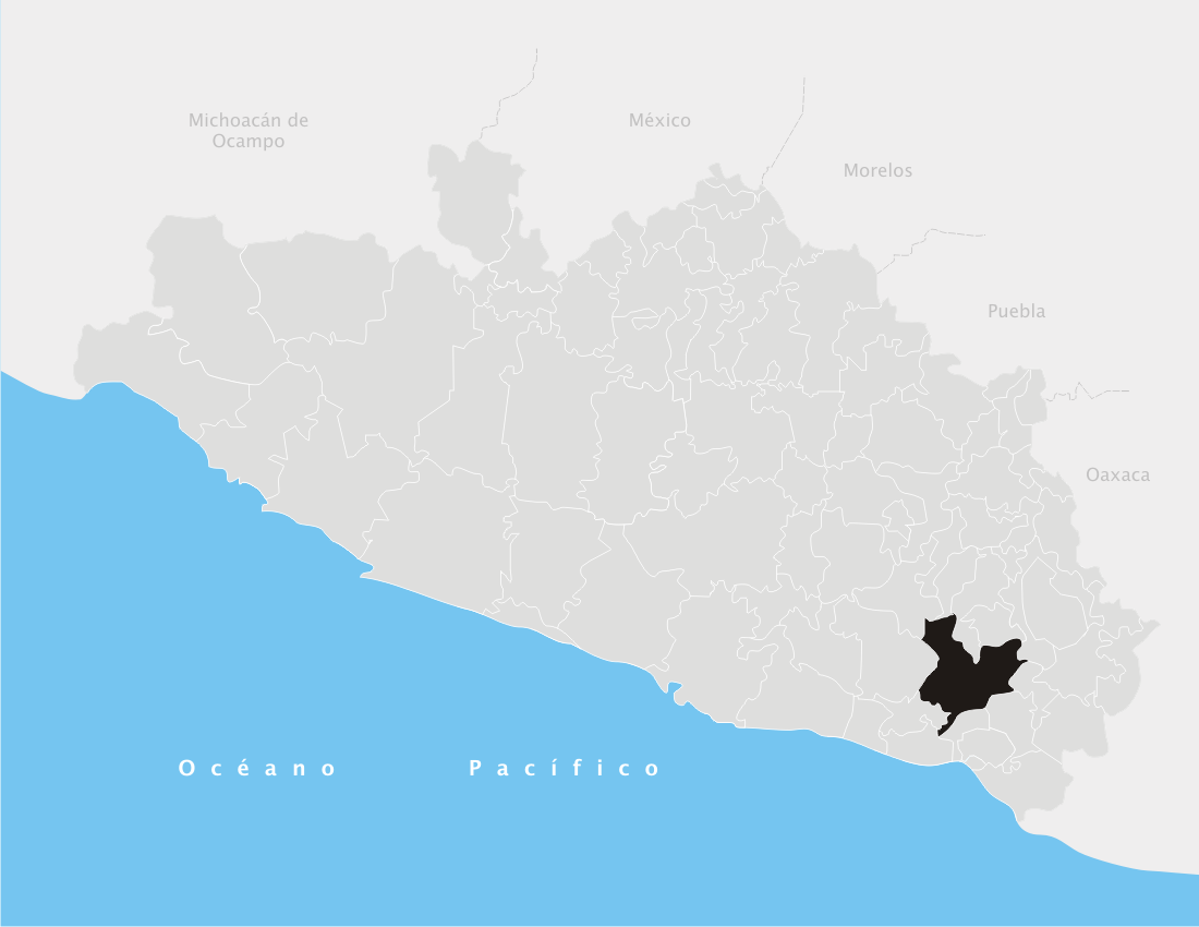 San Luis Acatlán en el estado de Guerrero (México)